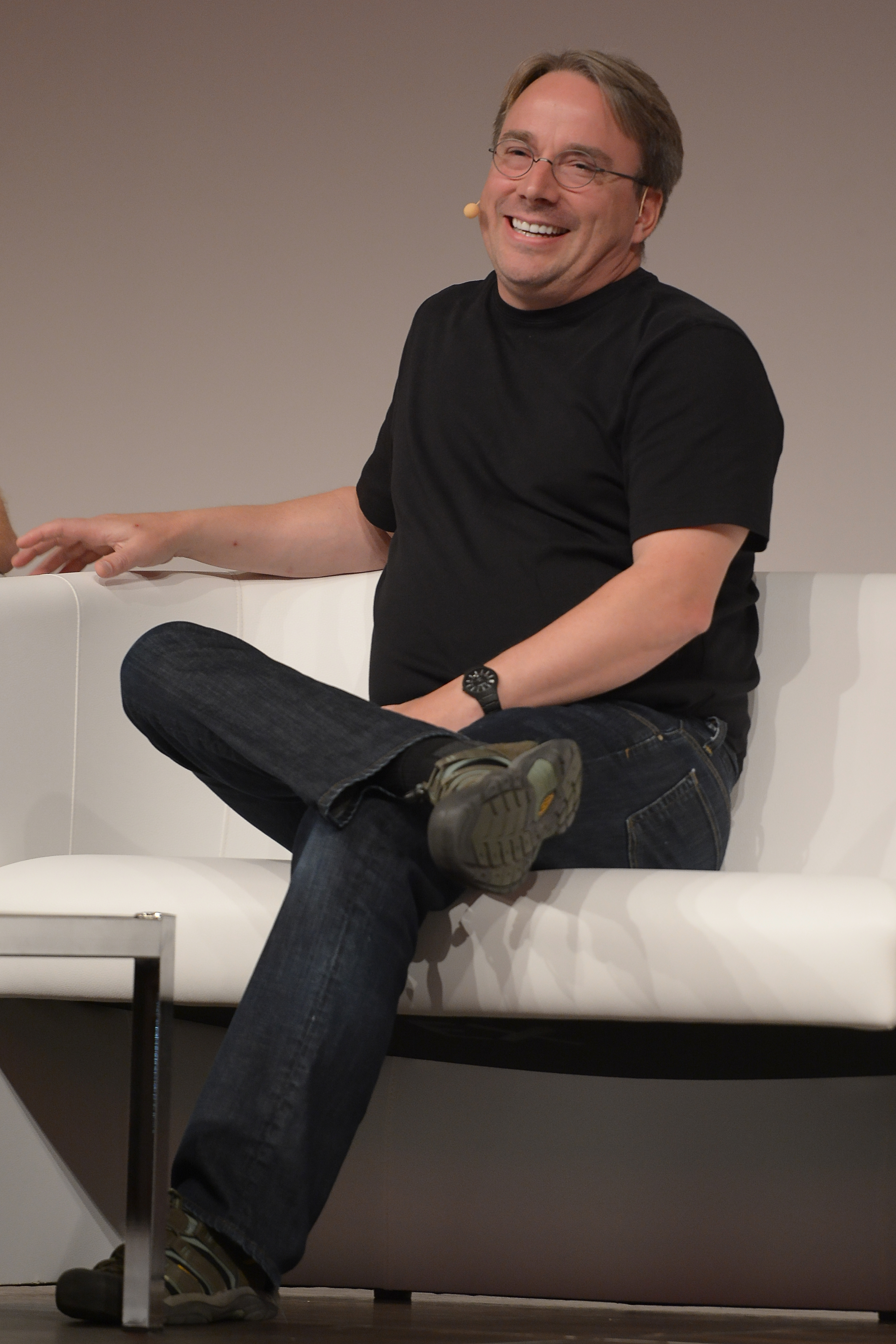 Linus Torvalds speaking at the LinuxCon Europe 2014 in Düsseldorf